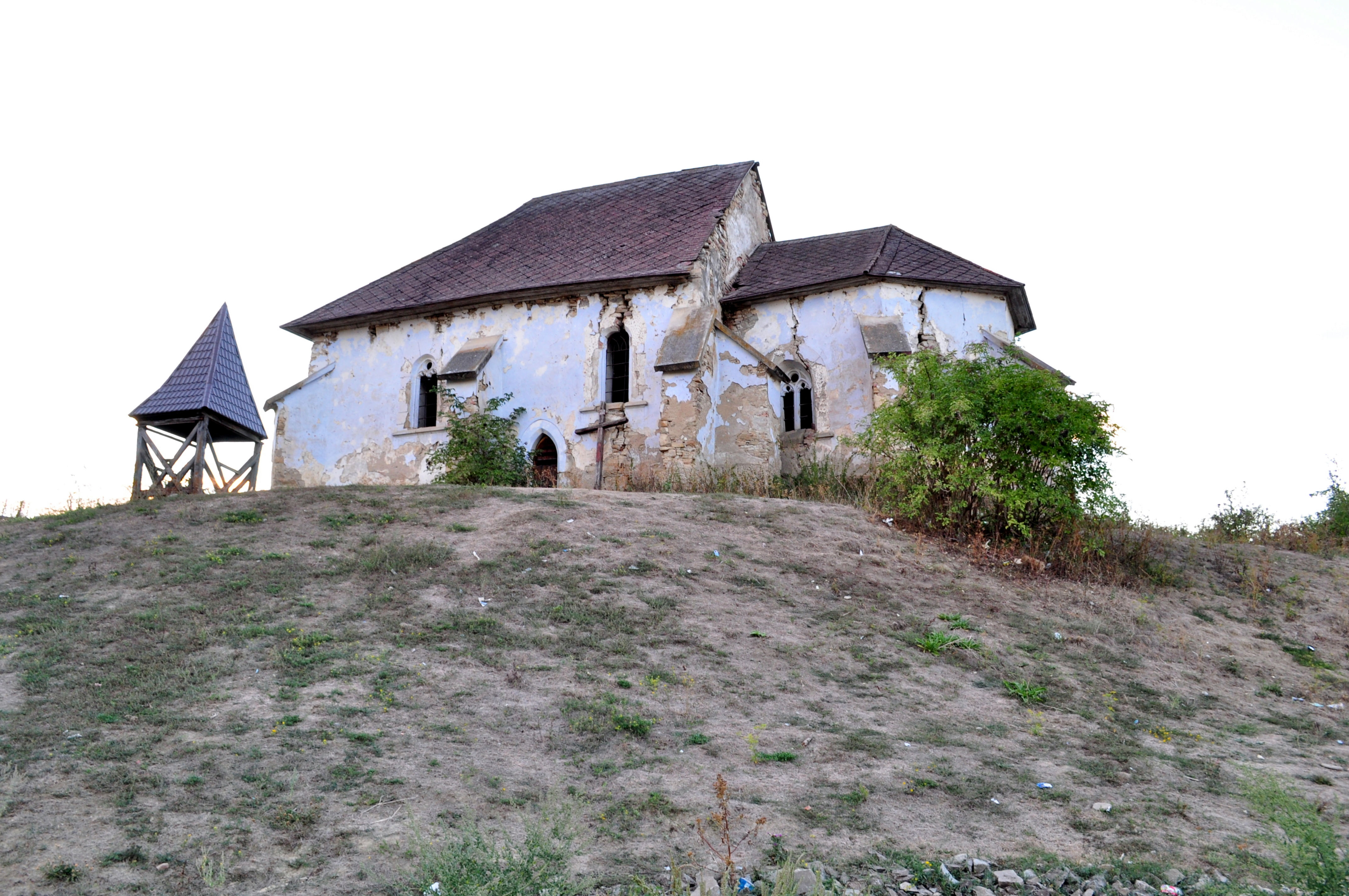 Ansamblul bisericii evanghelice, sat CORVINEŞTI; comuna MATEI